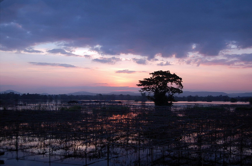 ถ่ายบริเวณอ่างเก็บน้ำเขื่อนห้วยหลวง ต.หนองบัวบาน อ.หนองวัวซอ จ.อุดรธานี